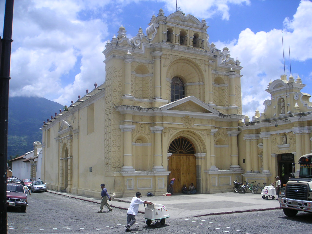 Antigua Guatemala, Guatemala. Photo: Soman